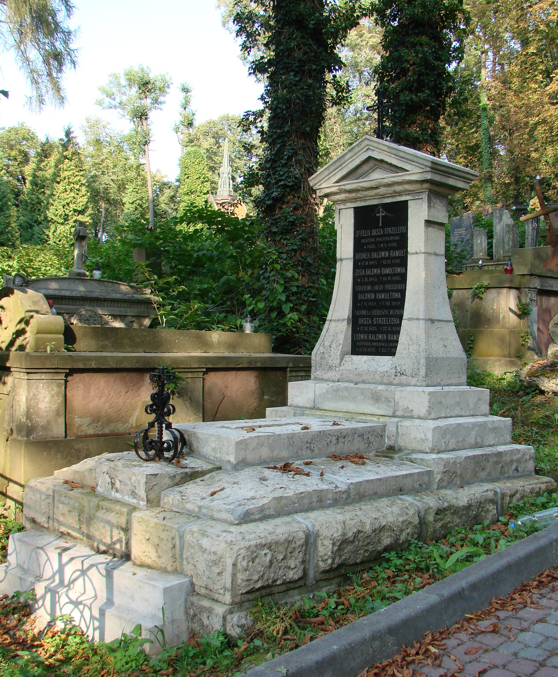 Гробівець у якому похований Л. Балдвін-Рамулт. Личаківський цвинтар , поле № 14.